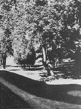 Беларуская (тарашкевіца): Магілёўцы (Mahiloŭcy), сядзіба Быхаўцаў (Bychaviec). Парк